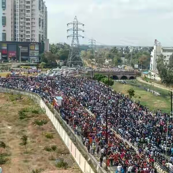 திருச்சி நீதிமன்றம் அருகே மக்கள் போராட்டம்.